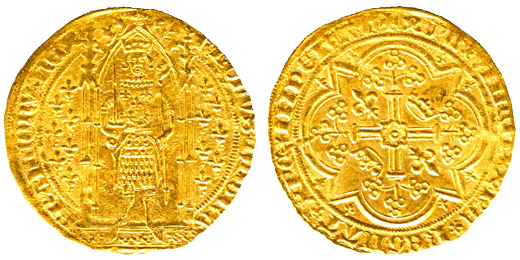 Franc à pied;Charles est représenté à pied avec un sceptre et une epée